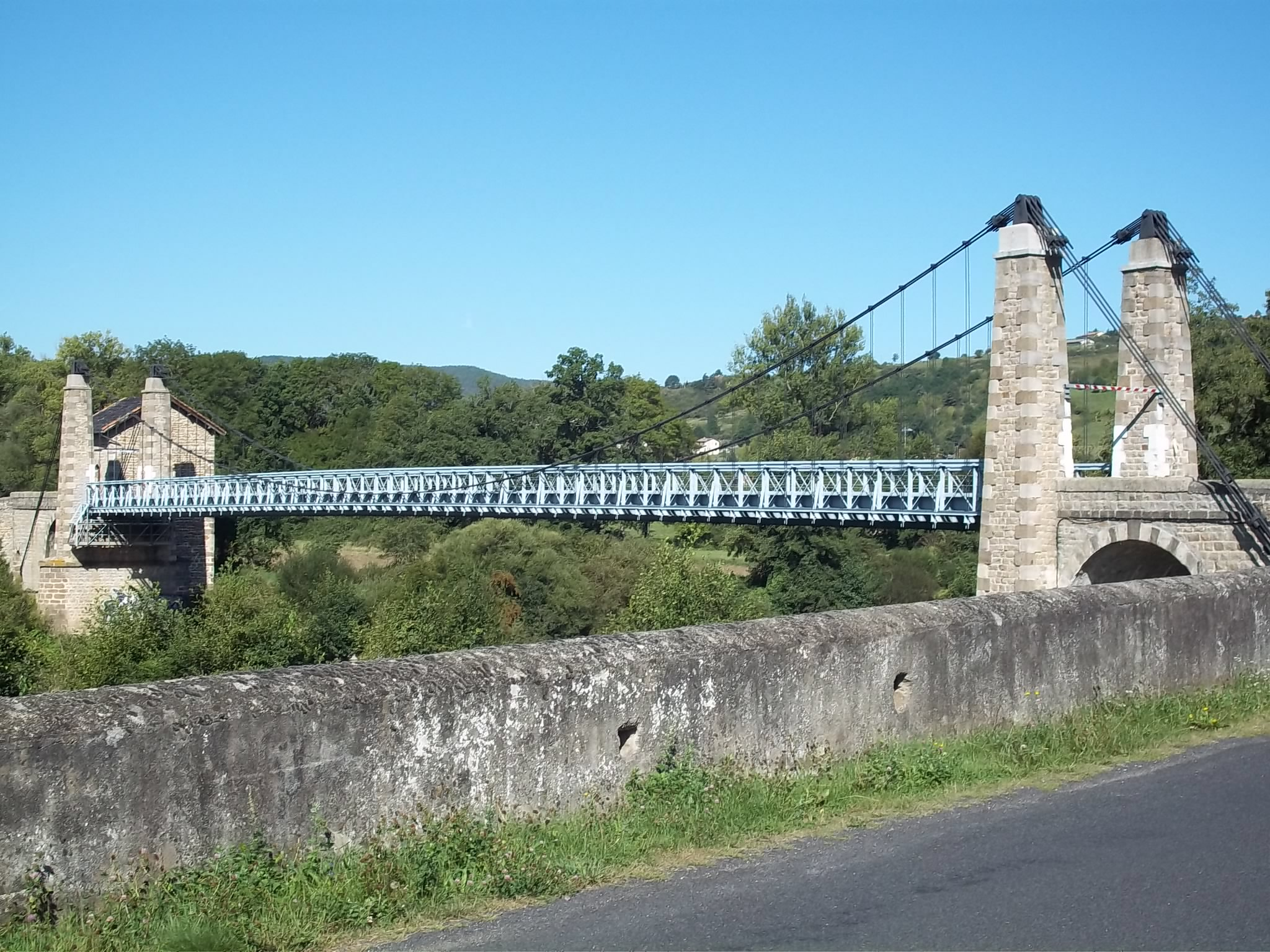 Vu d'un des accès au pont